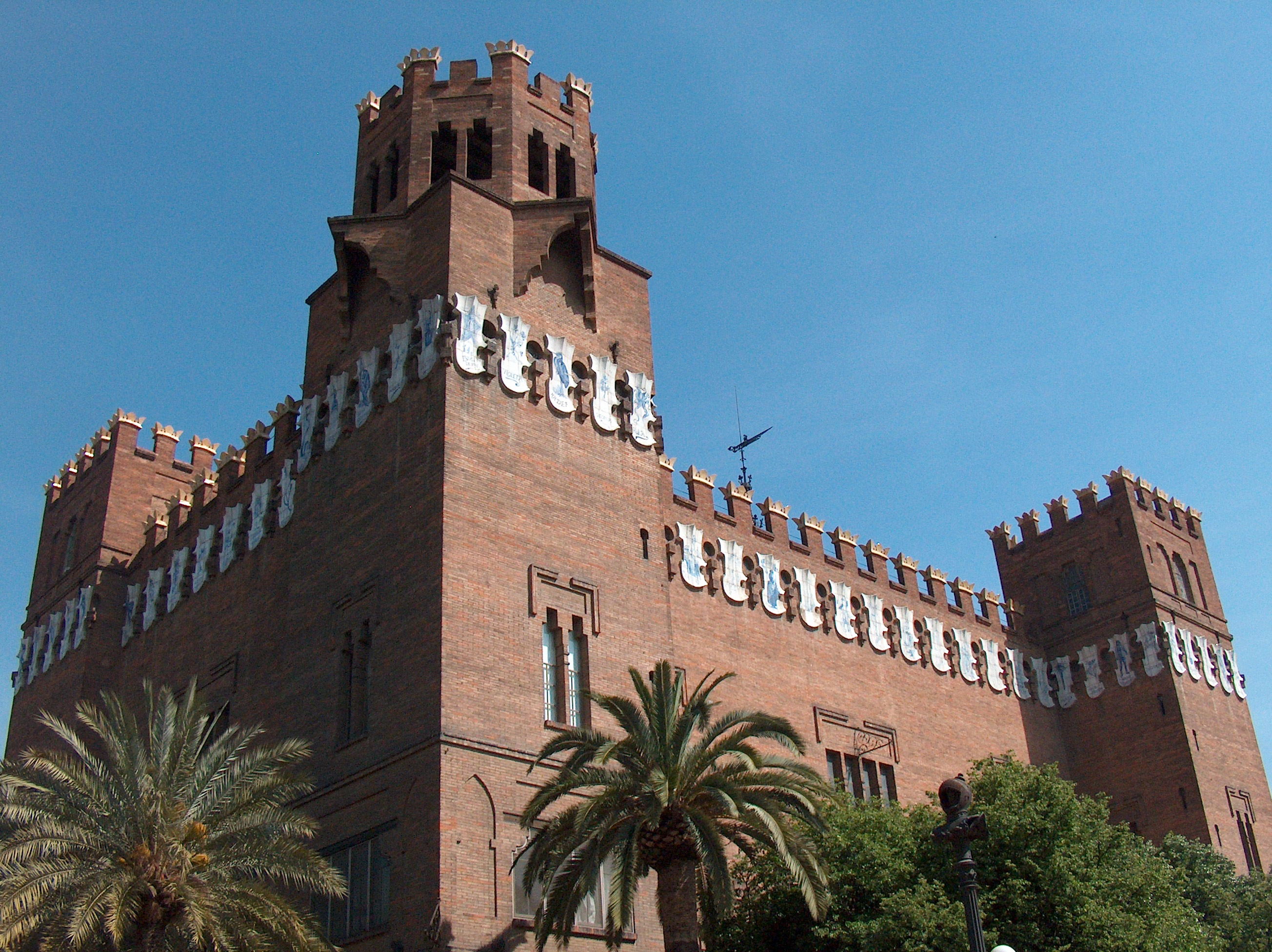 Façade du Museu de Zoologia (Barcelona)